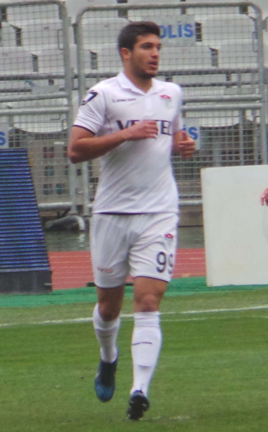 Gökdeniz Varol